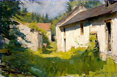 Jean-Pierre Beckius: Vieux moulin au soleil (Läerensmillen).